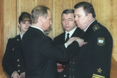 СЕВАСТОПОЛЬ. Вручение государственных наград военнослужащим Черноморского флота. Орденом «За заслуги перед Отечеством» IV степени награжден командующий Черноморским флотом Владимир Комоедов.